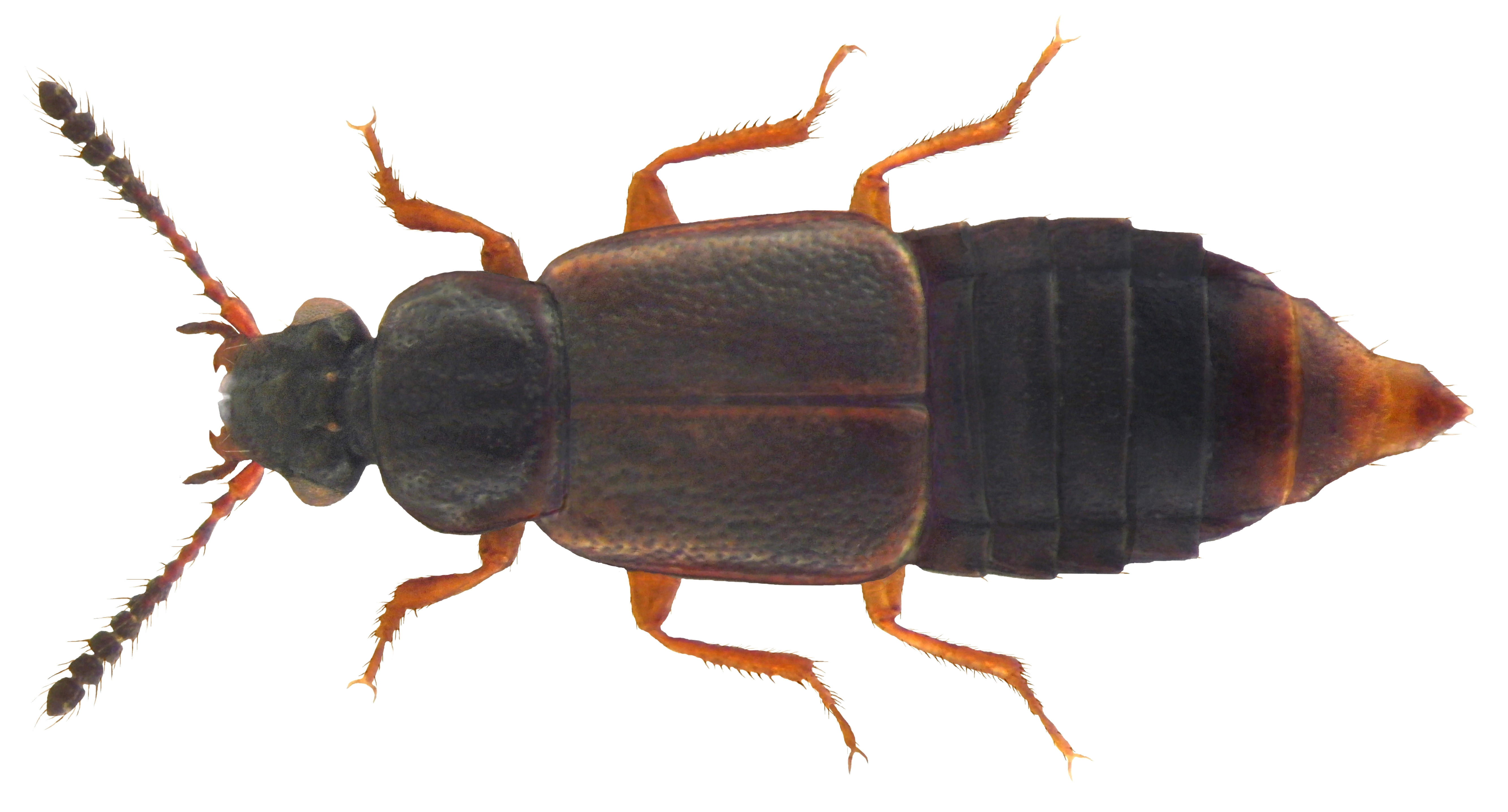 Familie: Staphylinidae Groesse: 2,5-3,5 mm Verbreitung: Europa Ökologie: lebt in Wäldern Fundort: Germania, Bayern, Oberfranken, Selbitz leg.det. U.Schmidt, 2001 Photo: U.Schmidt, 2010